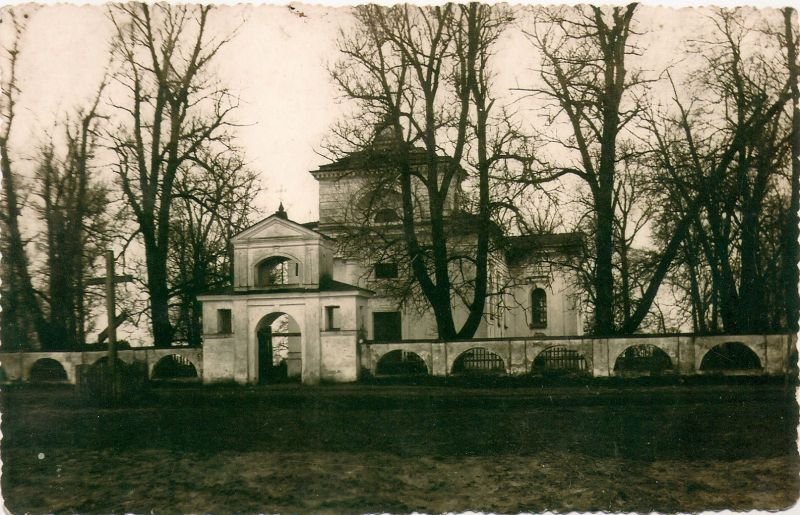 Альшэва. Касцёл Святога Войцеха (1937)